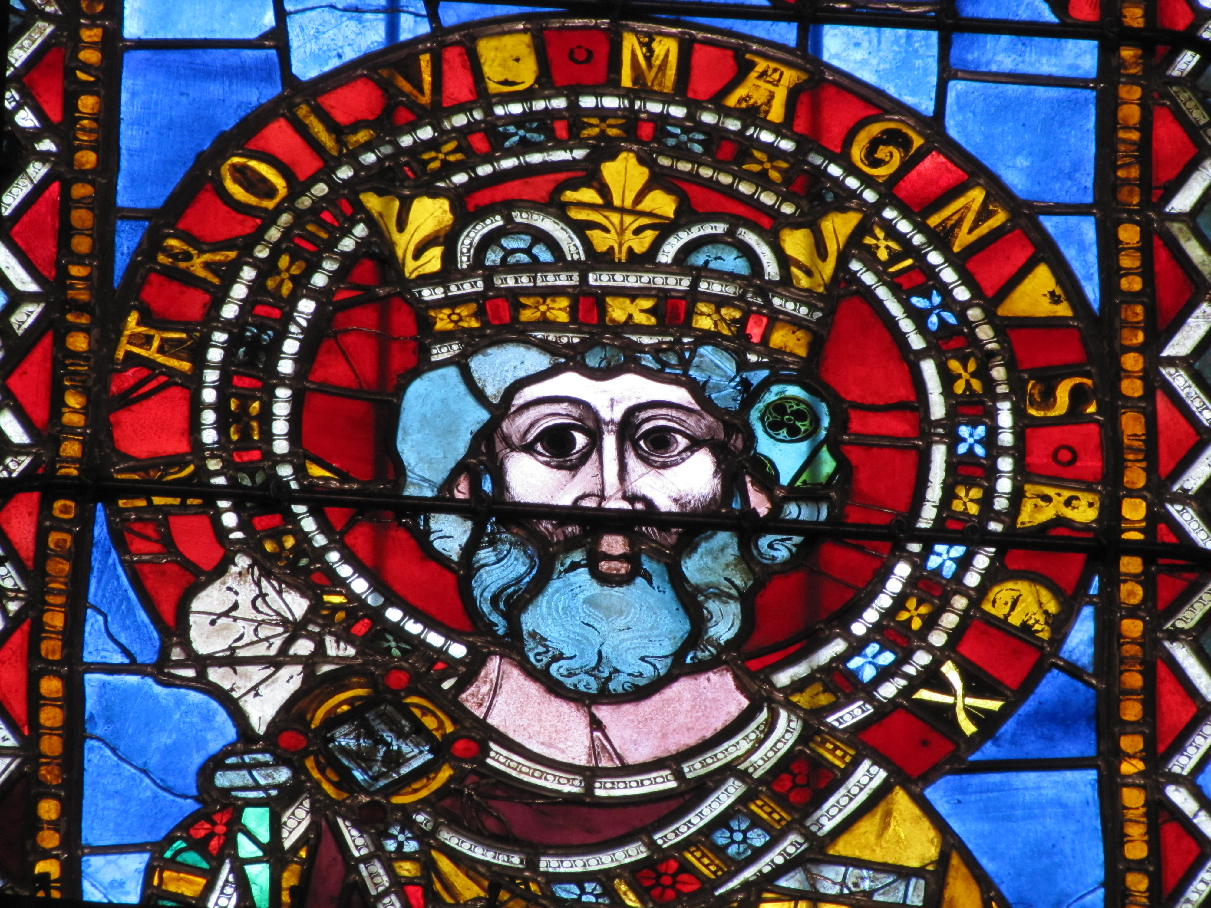 Alsace, Bas-Rhin, Cathédrale Notre-Dame de Strasbourg (PA00085015). Bas-côté nord, Verrière (1210-1270) "Empereurs Saint-Empire": Charlemagne